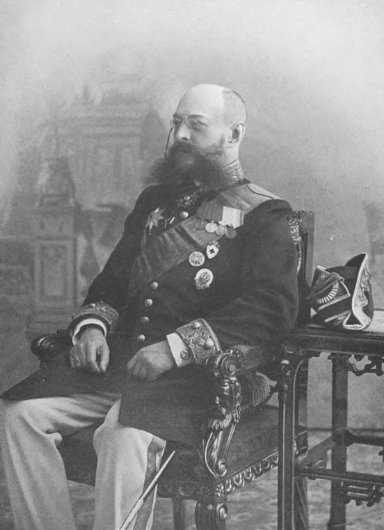 Николай Михайлович Клингенберг (1853 — ?) — российский государственный деятель, действительный статский советник, полицмейстер Виленской губернии, Вице-губернатор Ковенской губернии, Вятской губернии, Владимирской и Могилёвской губернии, сенатор.